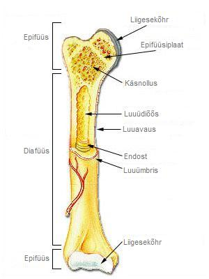 Toruluu ehitus